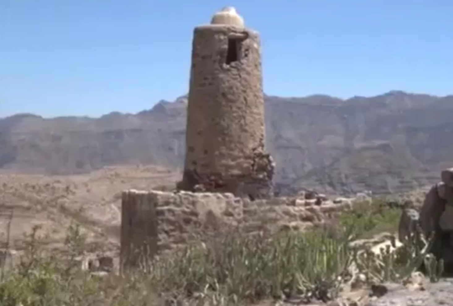 تم شراء جميع الاراضي المحيطه في هذه المنطقه من قبل الشيخ احمد محمد العمري المقيم في قرية السلم عزلة ذبحان ومازالت ملكا لاحفاده حتى الان